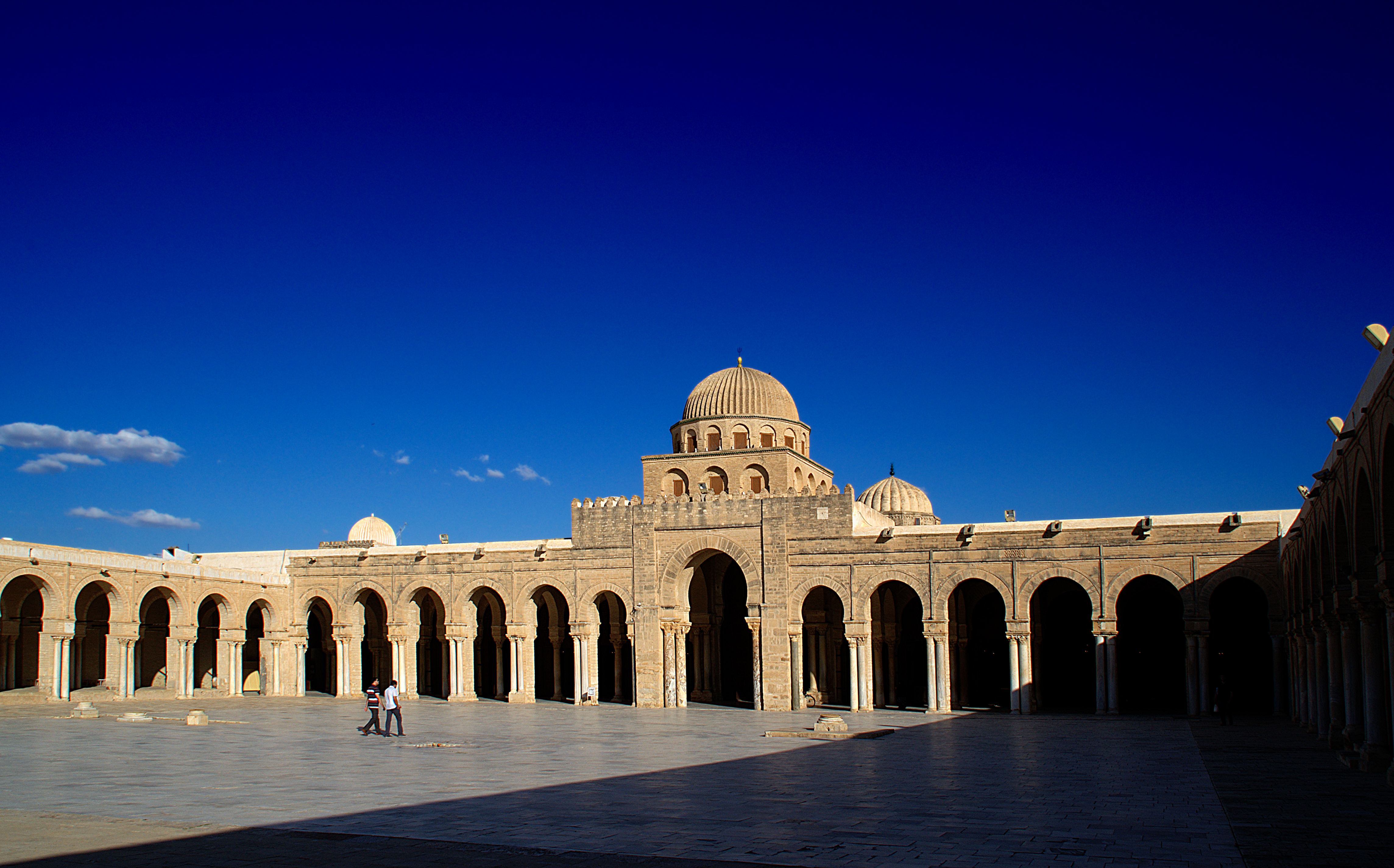 Grande Mosquée (Sidi Okba), Kairouan